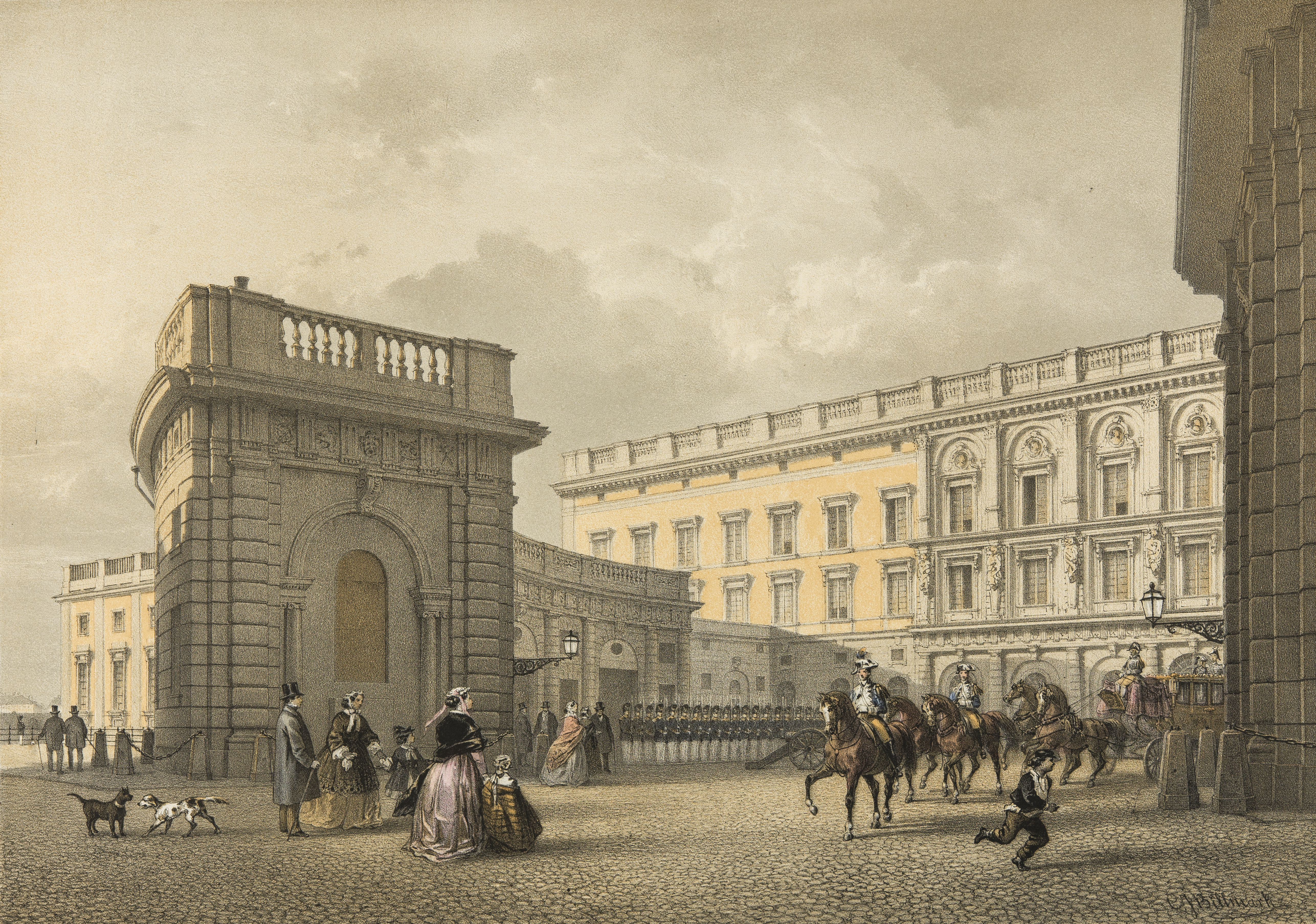 Yttre borggården, Stockholm Litografi från Uppsala universitetsbibliotek